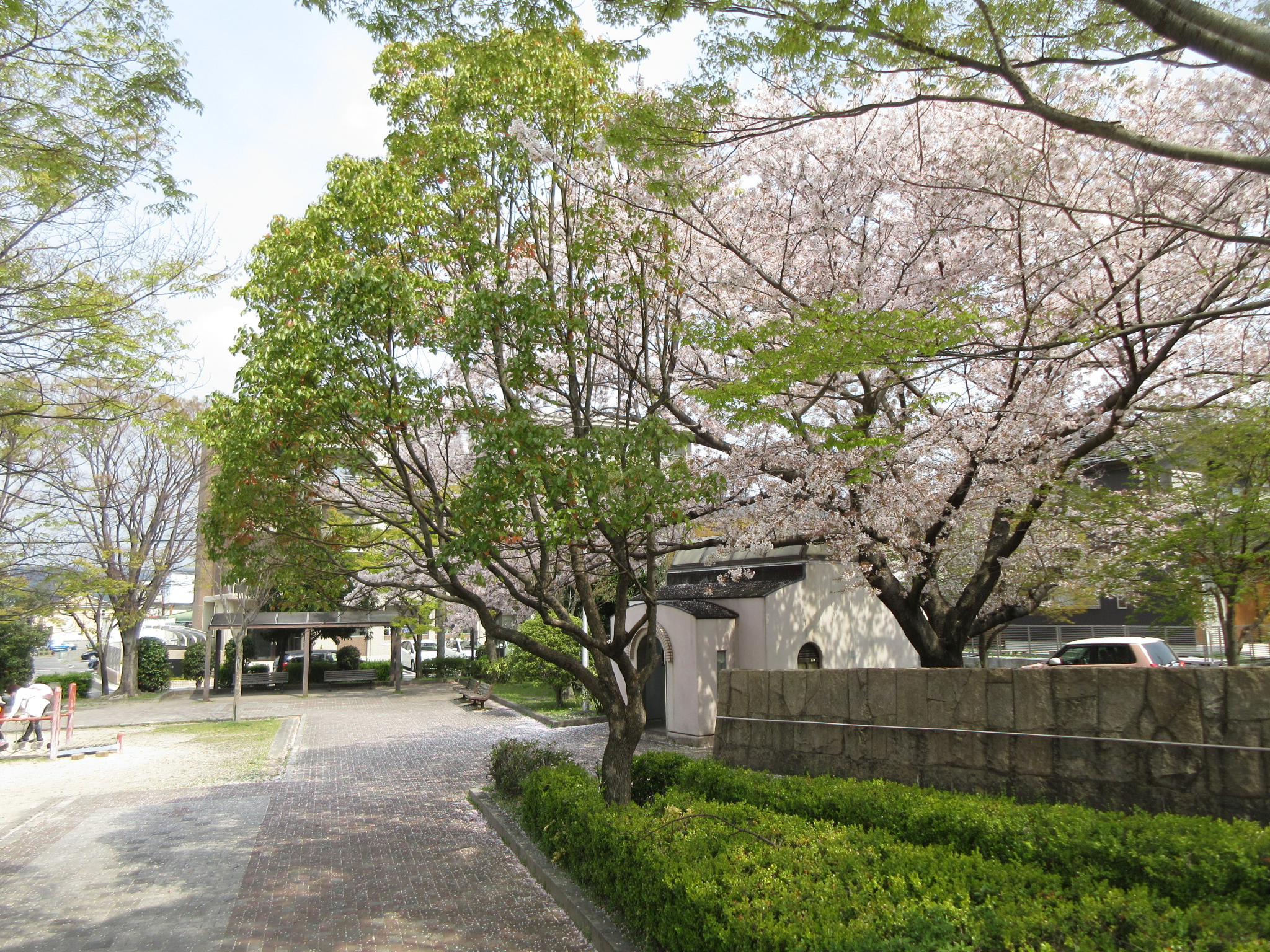 あおい公園（岡崎市蓑川新町）